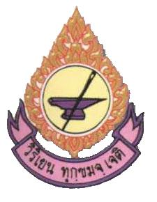 เรารักศรีบุณยานนท์